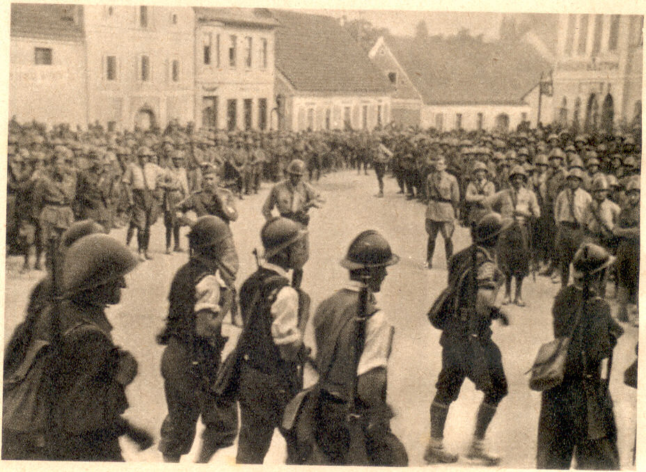 Slovenske vasške straže trenirajo pod italijanskim poveljstvom